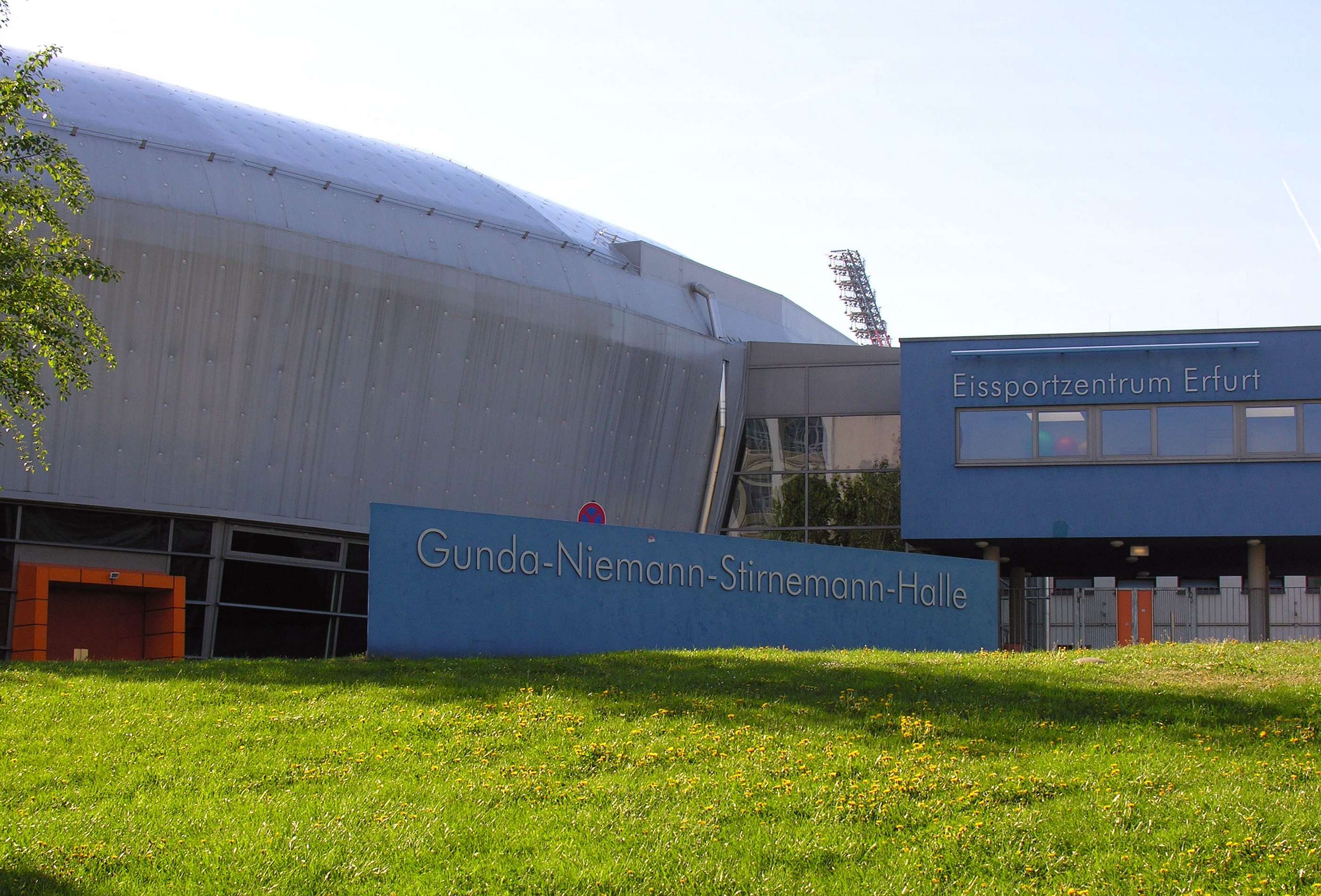 Die Erfurter Gunda-Niemann-Stirnemann-Halle, das moderne Eissportzentrum in Thüringen - Foto Wolfgang Pehlemann Steinberg Ostsee DSCN1553